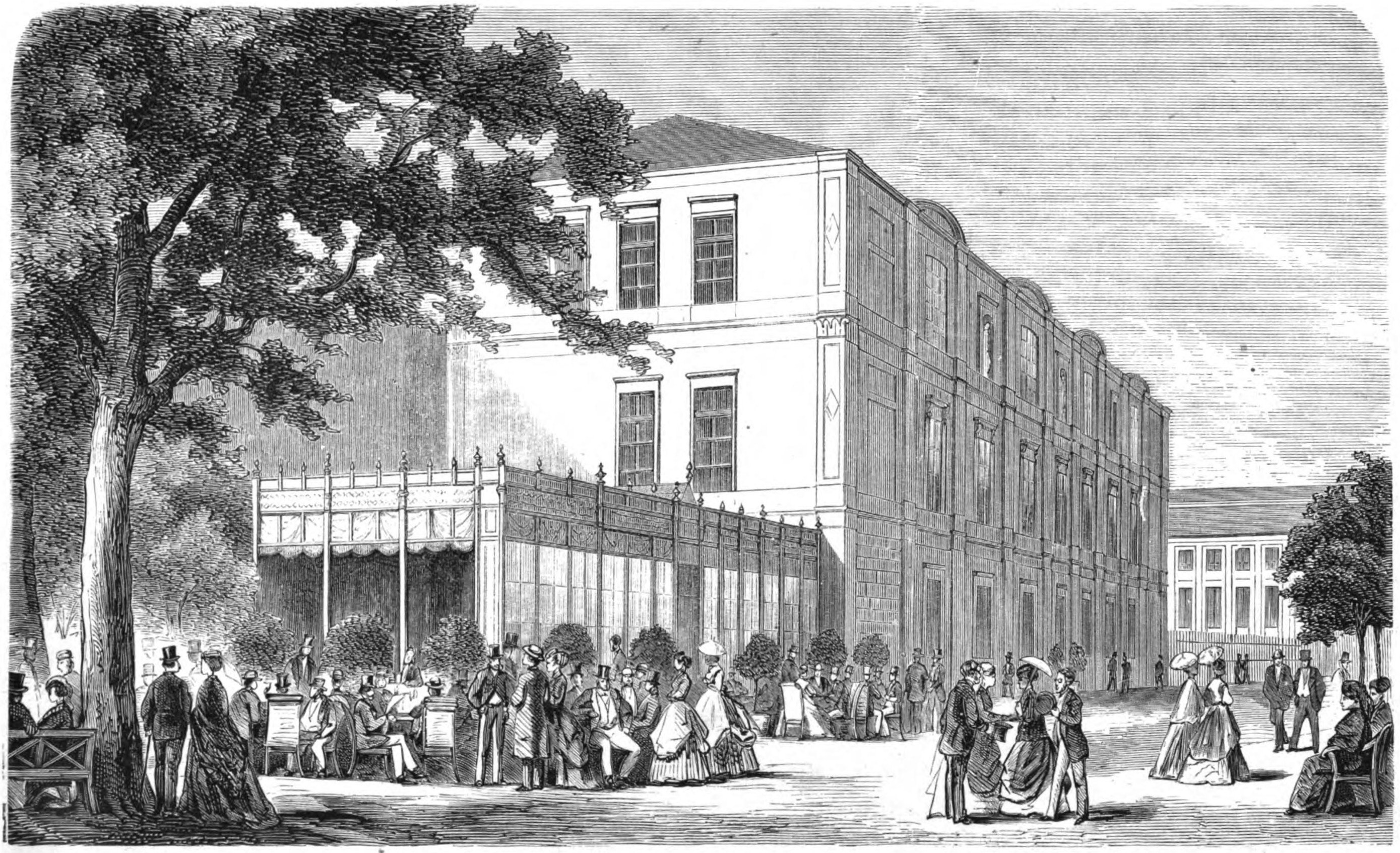 Blanchs café i Kungsträdgården, från Nordiske Billeder, fjärde bandet. Köpenhamn 1870.